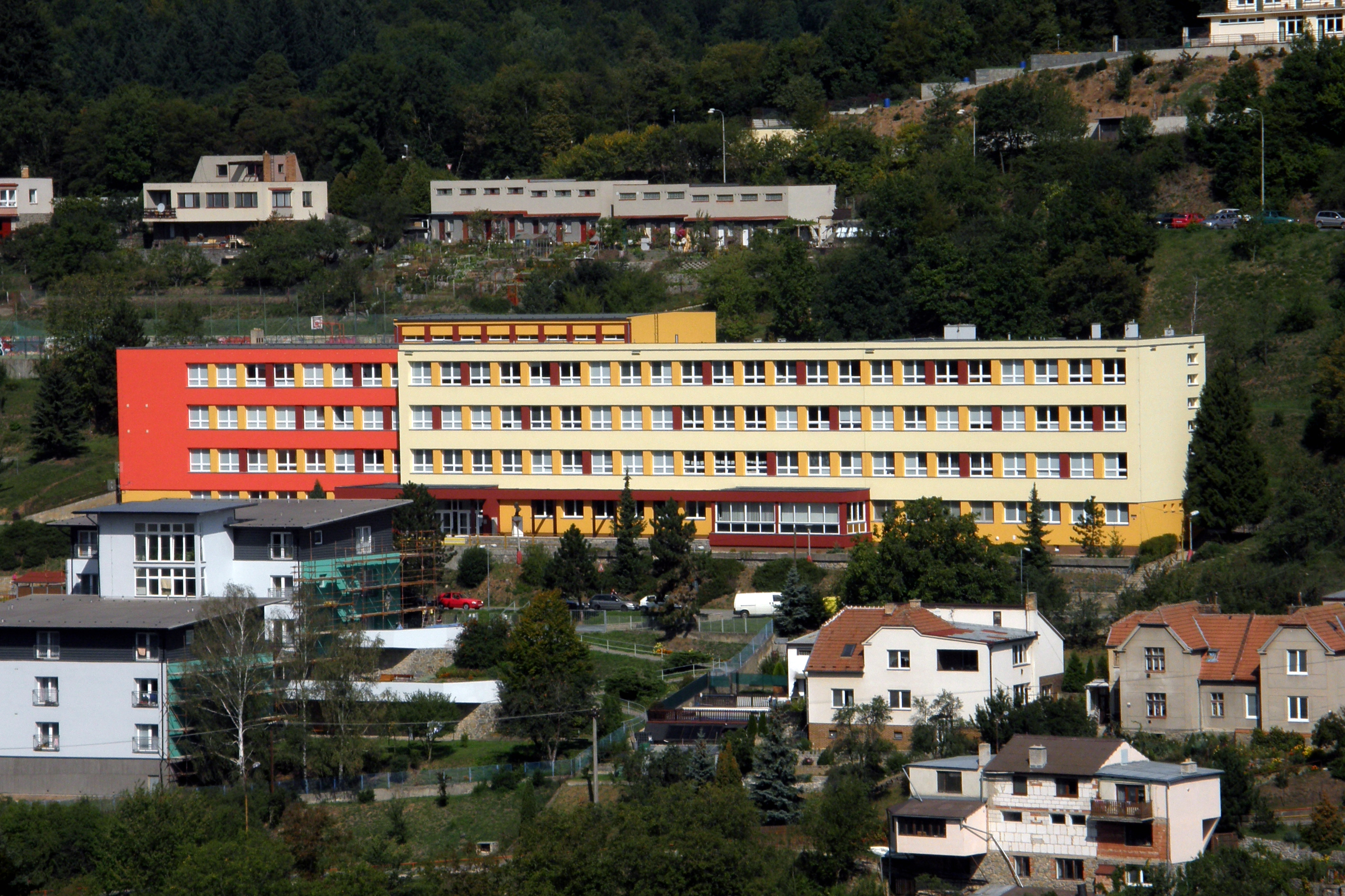 Budova (číslo popisné 324) Základní školy na ulici Komenského v Adamově.